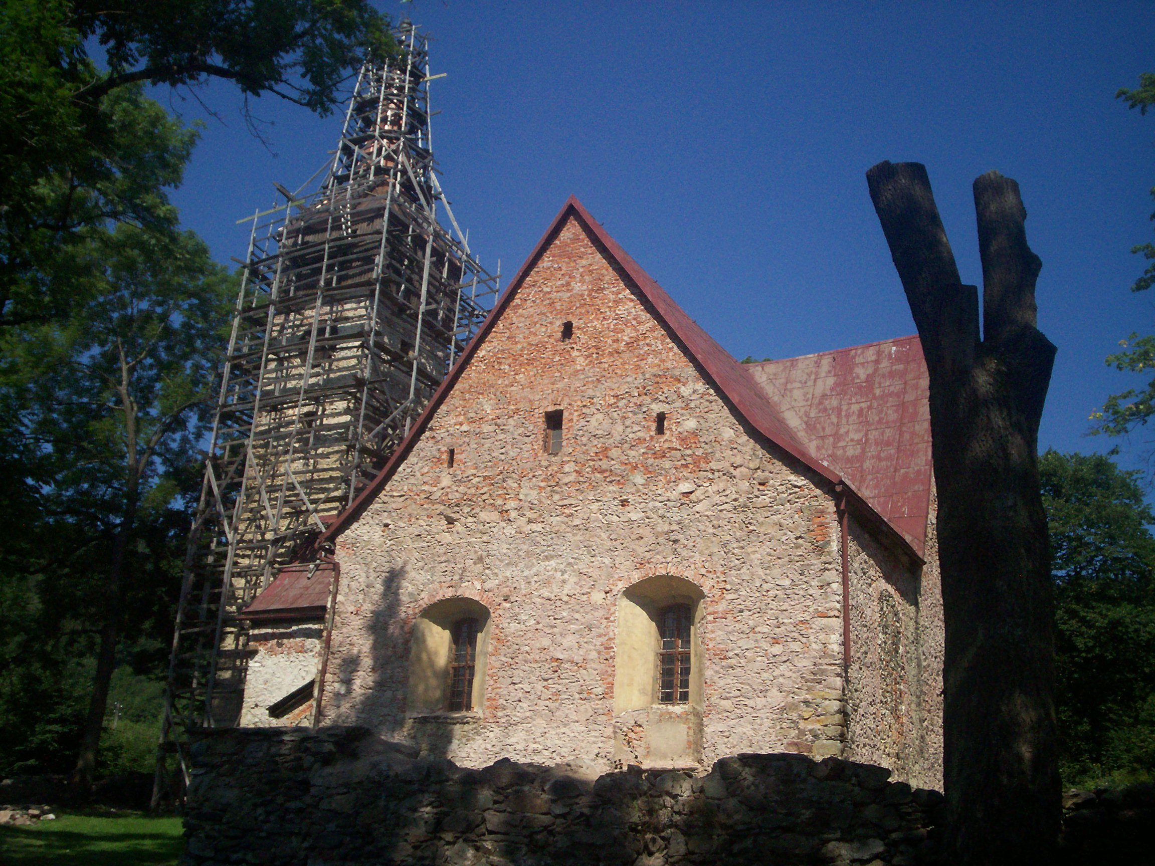 Raszów, kościół pw. Niepokalanego Poczęcia NMP.